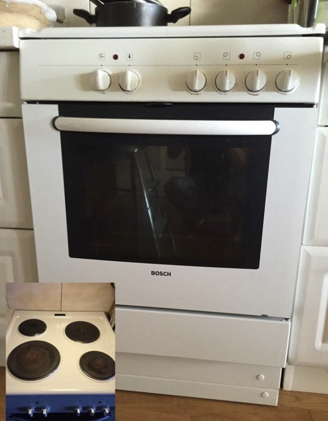 En spis med gjutgärnsplattor av märket Bosch